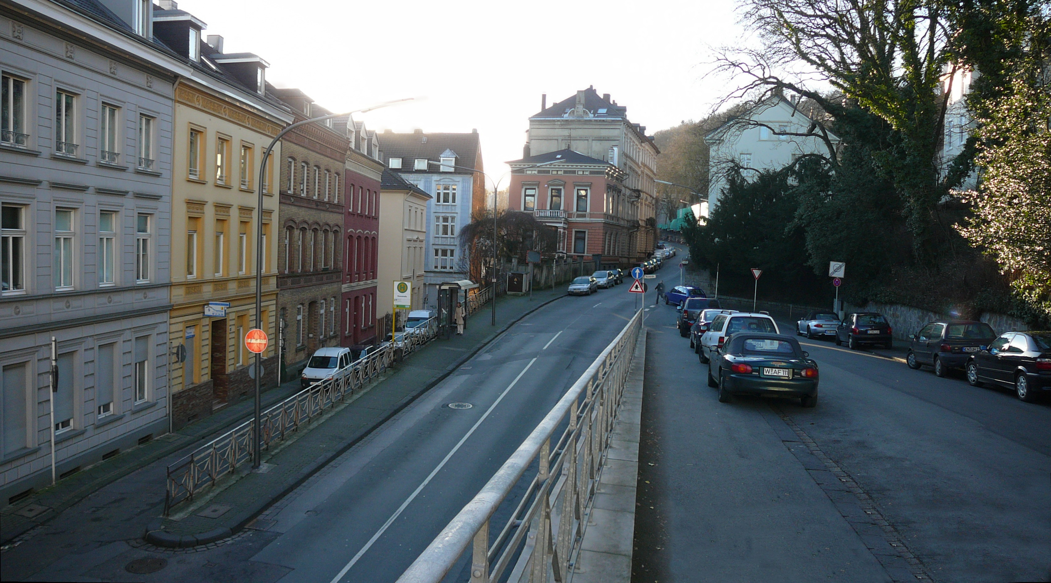 im Briller Viertel, Roonstr, Wuppertal